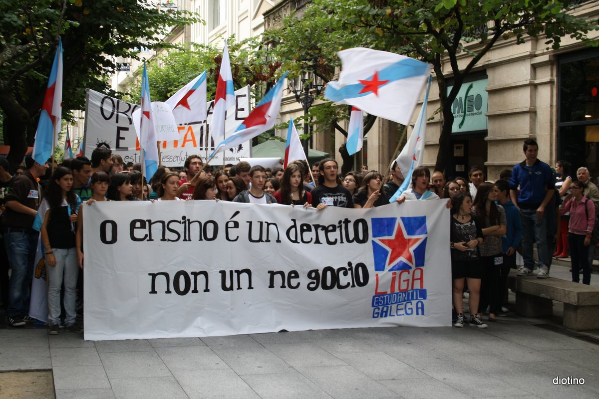 foto mobilización contra os recortes no ensino